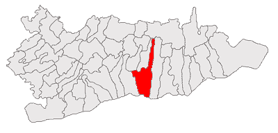 Categorie:Hărţi ale judeţului Călăraşi